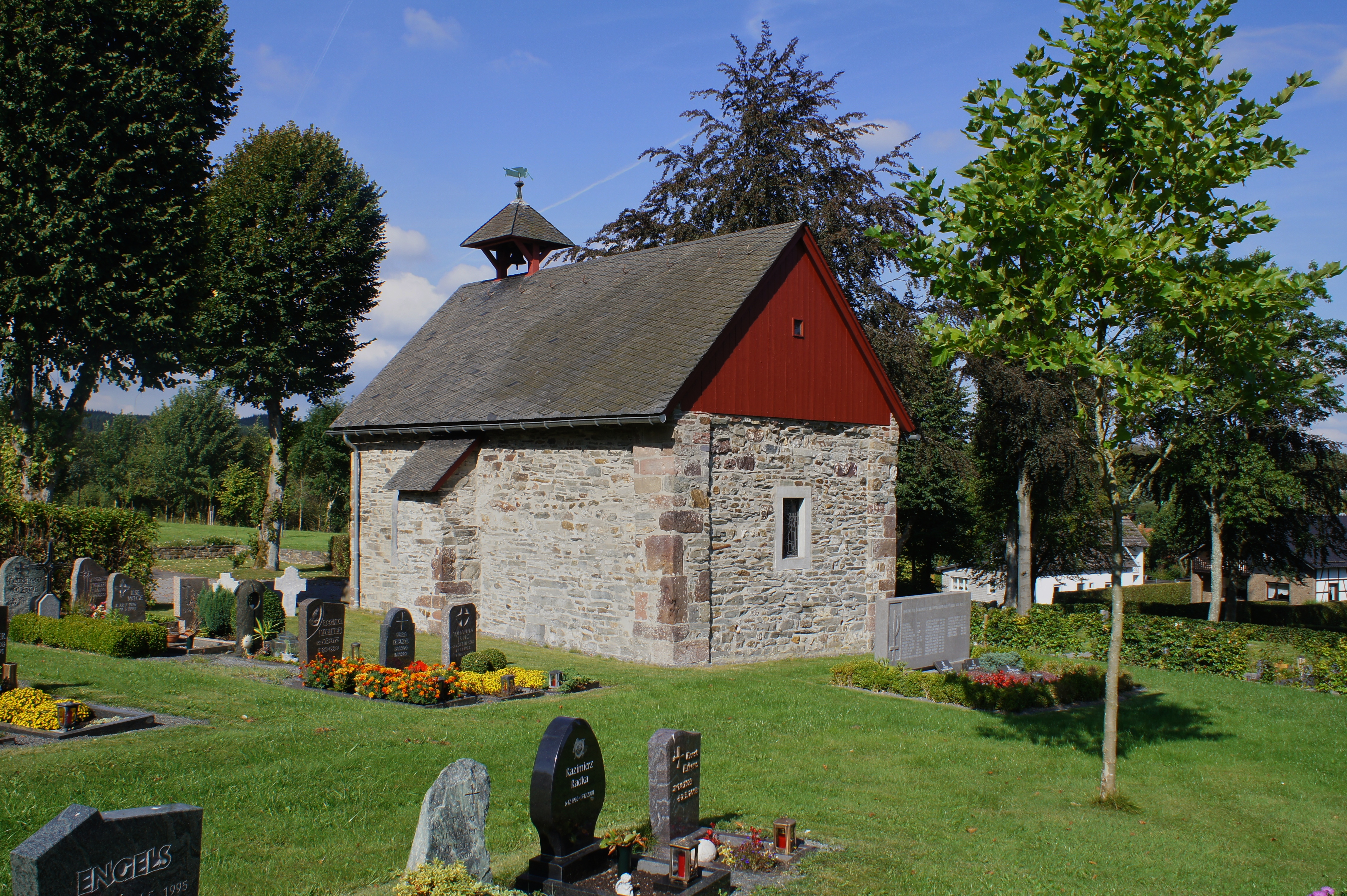 Konzen Pankratius KapelleThis is a photograph of an architectural monument., no. 0